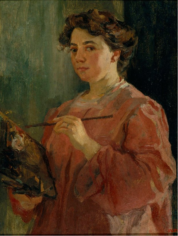 Self-portrait